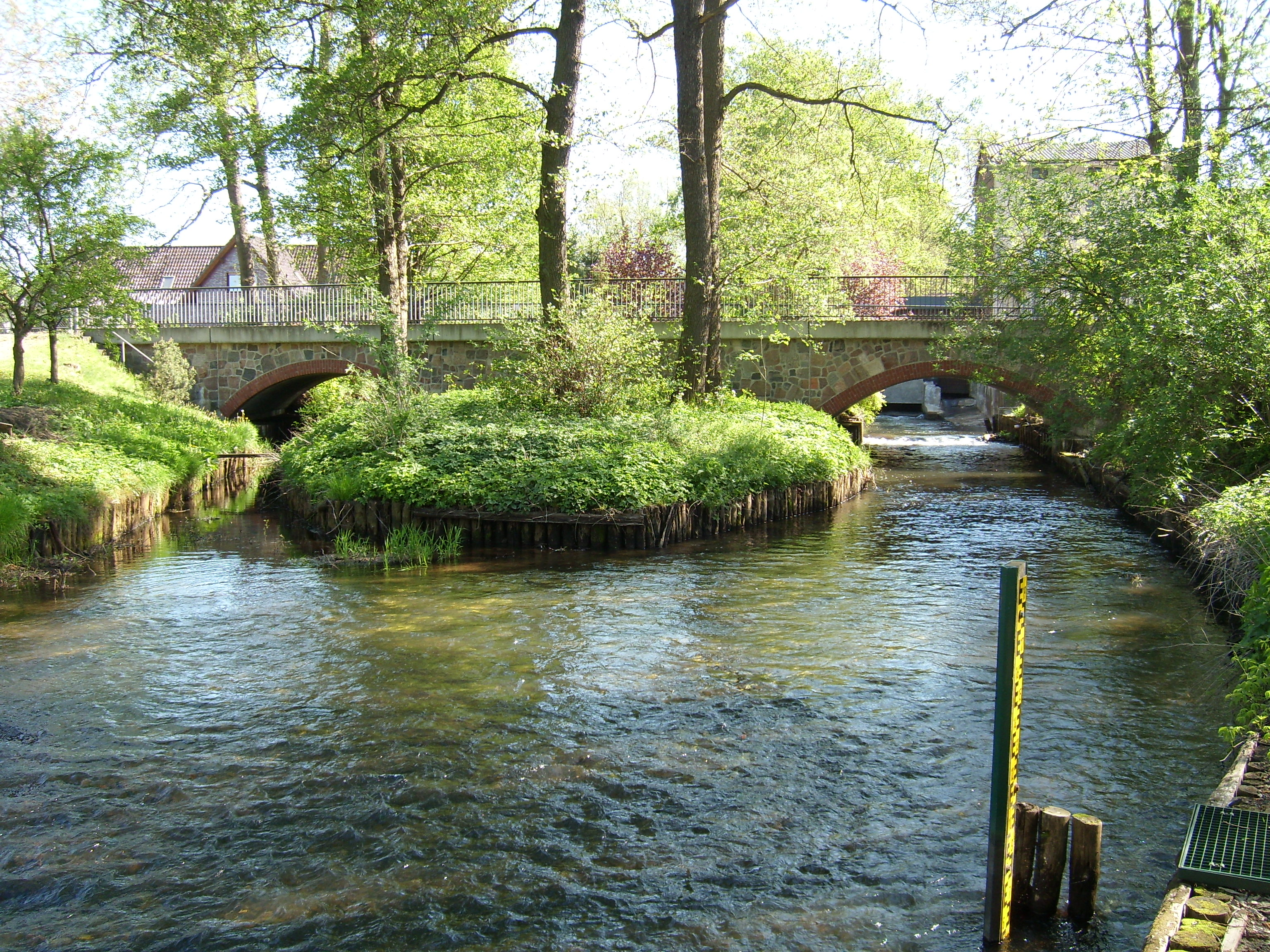 Das Doberburger Mühlenfließ unterhalb der Wassermühle Doberburg und der Straßenbrücke